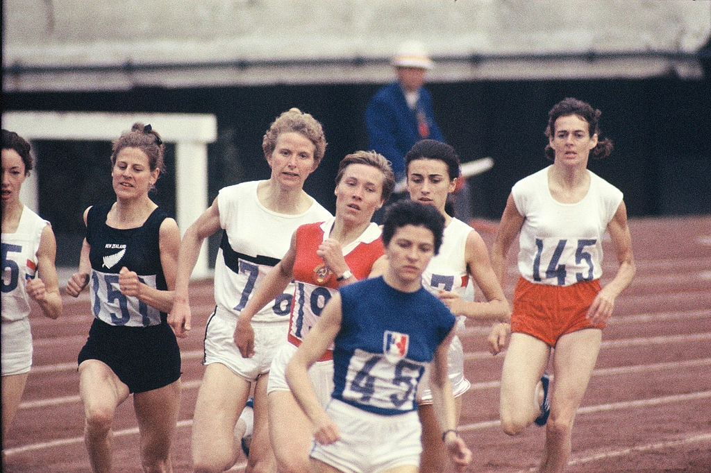 Women 800 m final 1964 Olympics. Left-right: Ann Packer (half-cut), Marise Chamberlain, Antje Gleichfeld, Laine Kallas, Maryvonne Dupureur (front), Zsuzsa Szabó, Gerda Kraan 1964